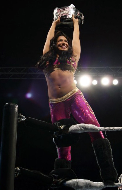 Melina